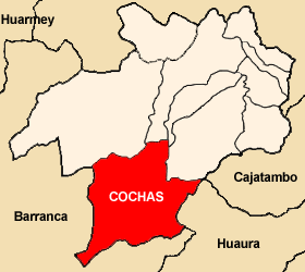 Distrito de Cochas